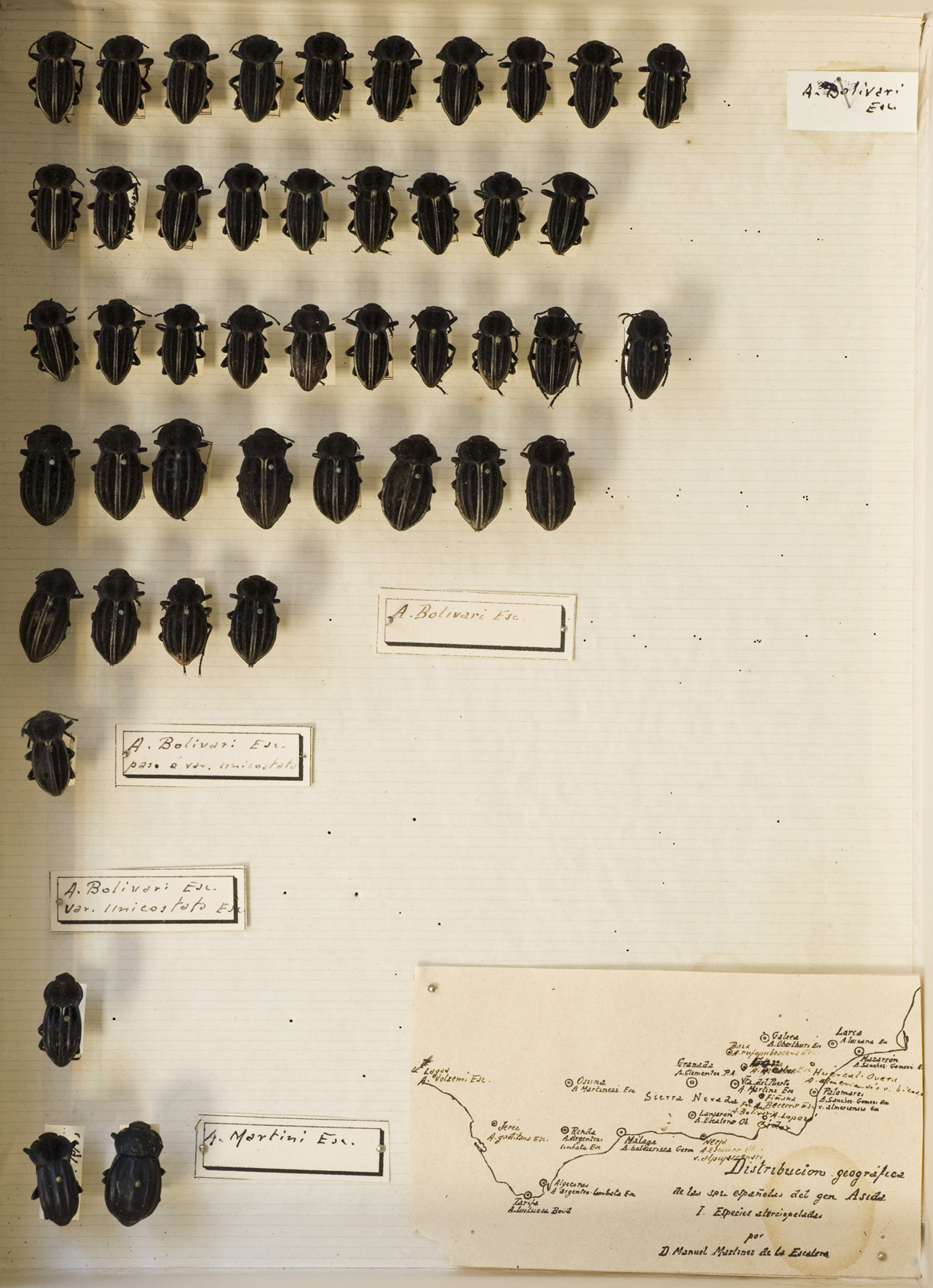 Ejemplares del género Asida (Coleoptera: Tenebrionidae). Caja entomológica de la Colección Escalera, MNCN. Fotografía: M. Sánchez Ruiz.